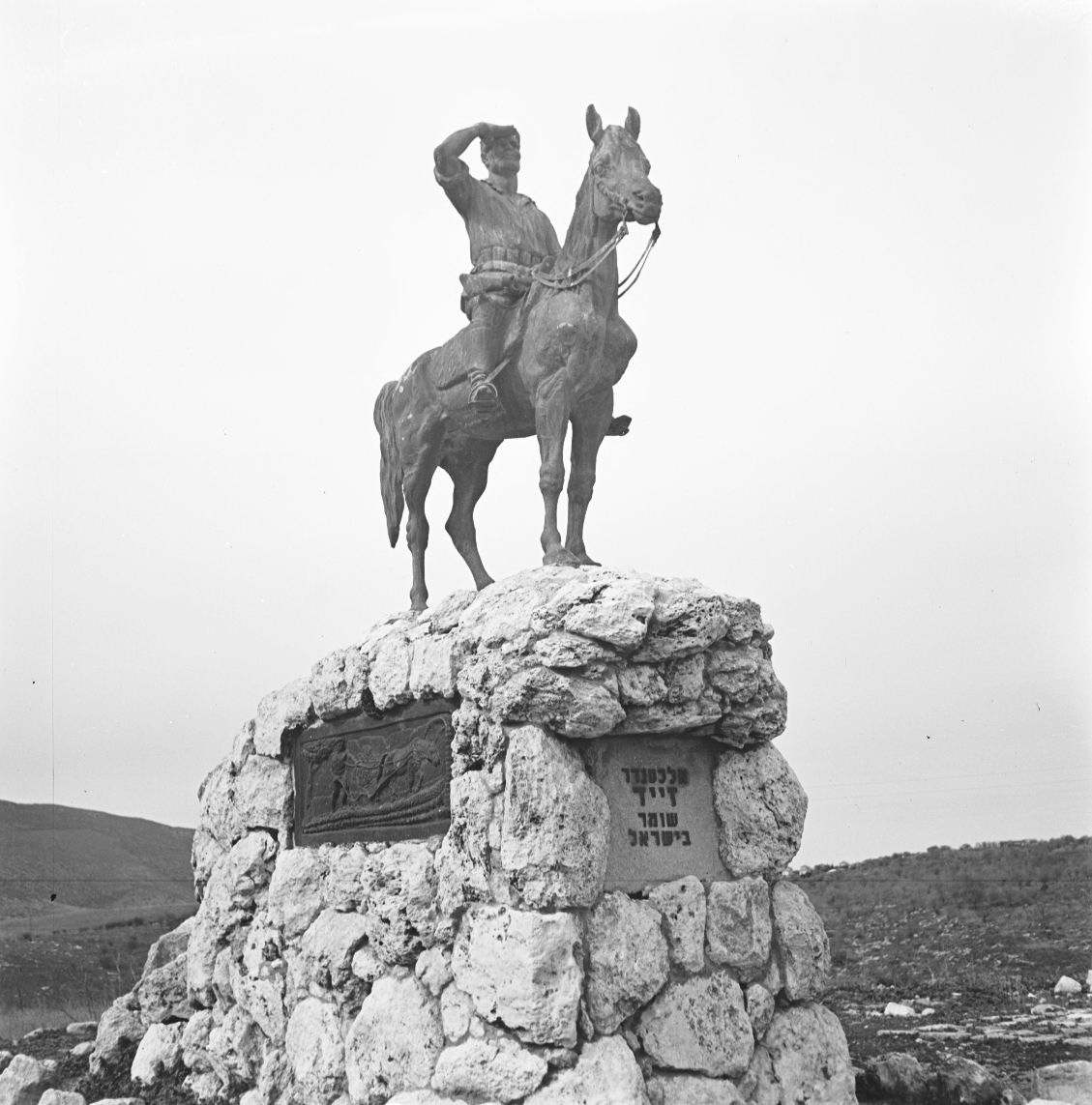 אוסף צילומים של הצלם זולטן קלוגר טווח מספרי התשלילים 26391 - 26517